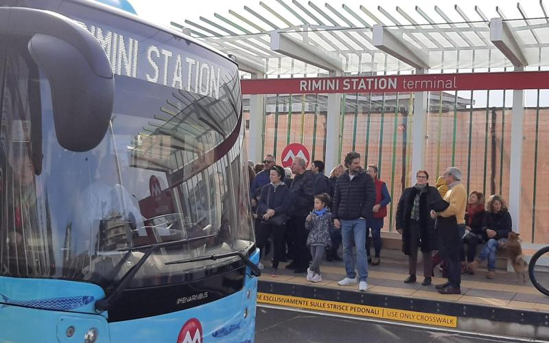 Rimini Station terminal (Metromare)